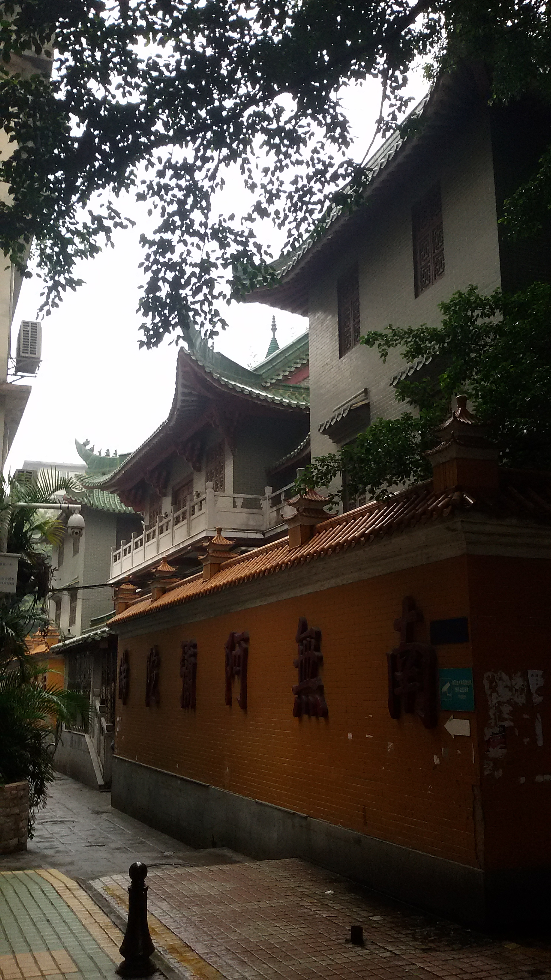 粵語: 無着庵嘅正門（南門）附近